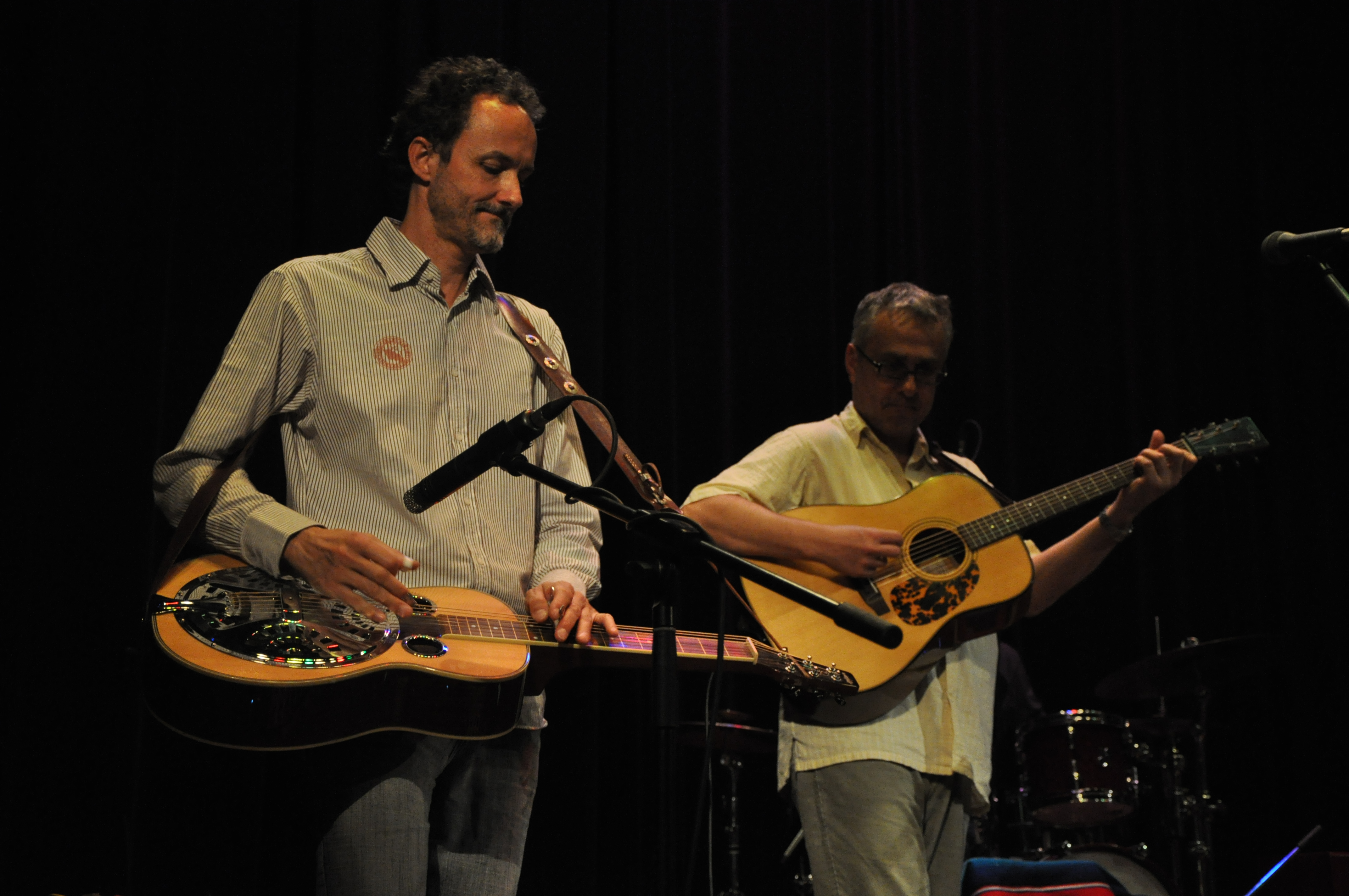 Luboš Novotný a Emil Formánek na dvojkoncertě Garcia a Druhá tráva v Hradci Králové 18. dubna 2009.